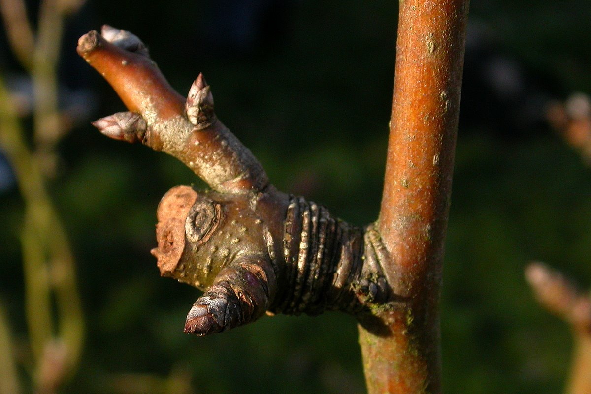 Pear flower buds - Bourse de poirier